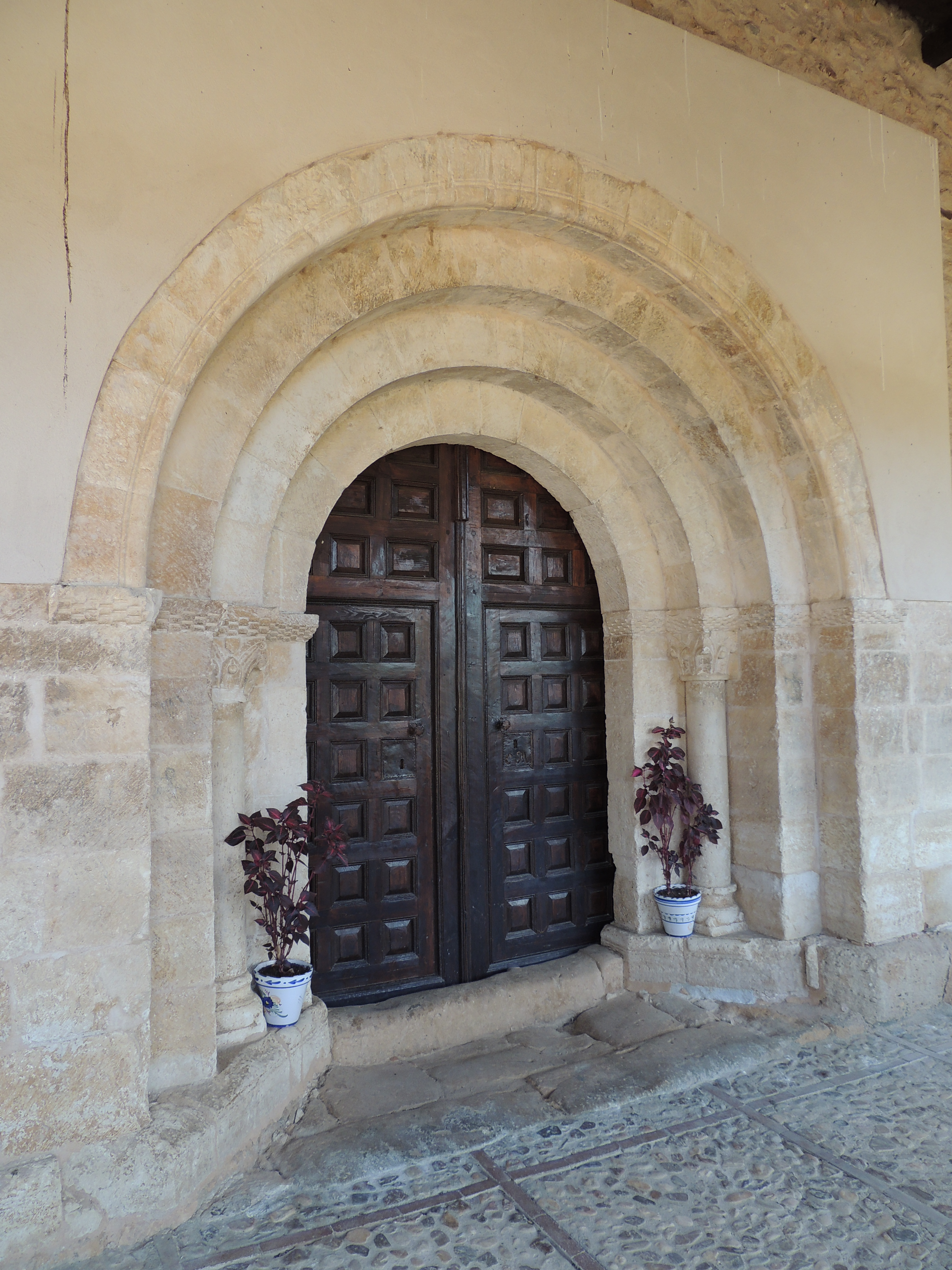 Portada